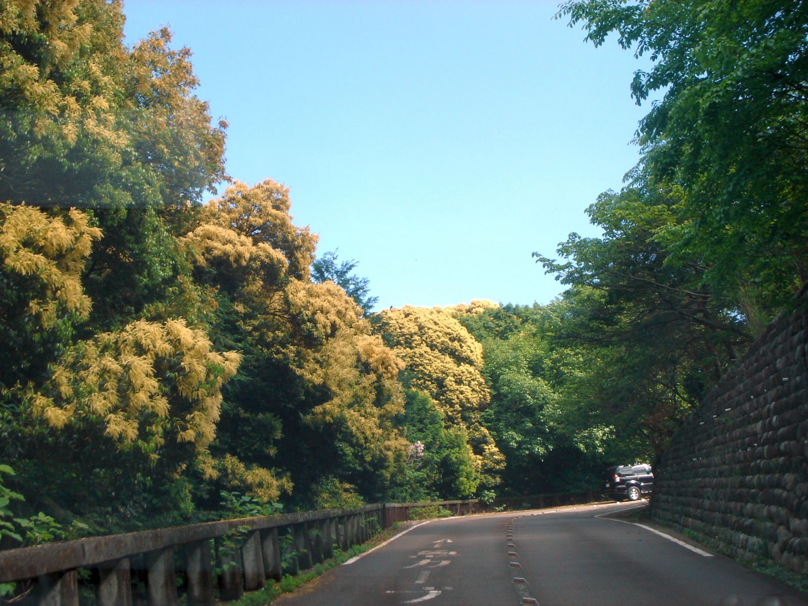 Mt_Kinka_Driveway（金華山ドライブウェイ）,Gifu,Gifu,Japan(岐阜県岐阜市)で撮影。黄色の部分はツブラジイが咲いている。